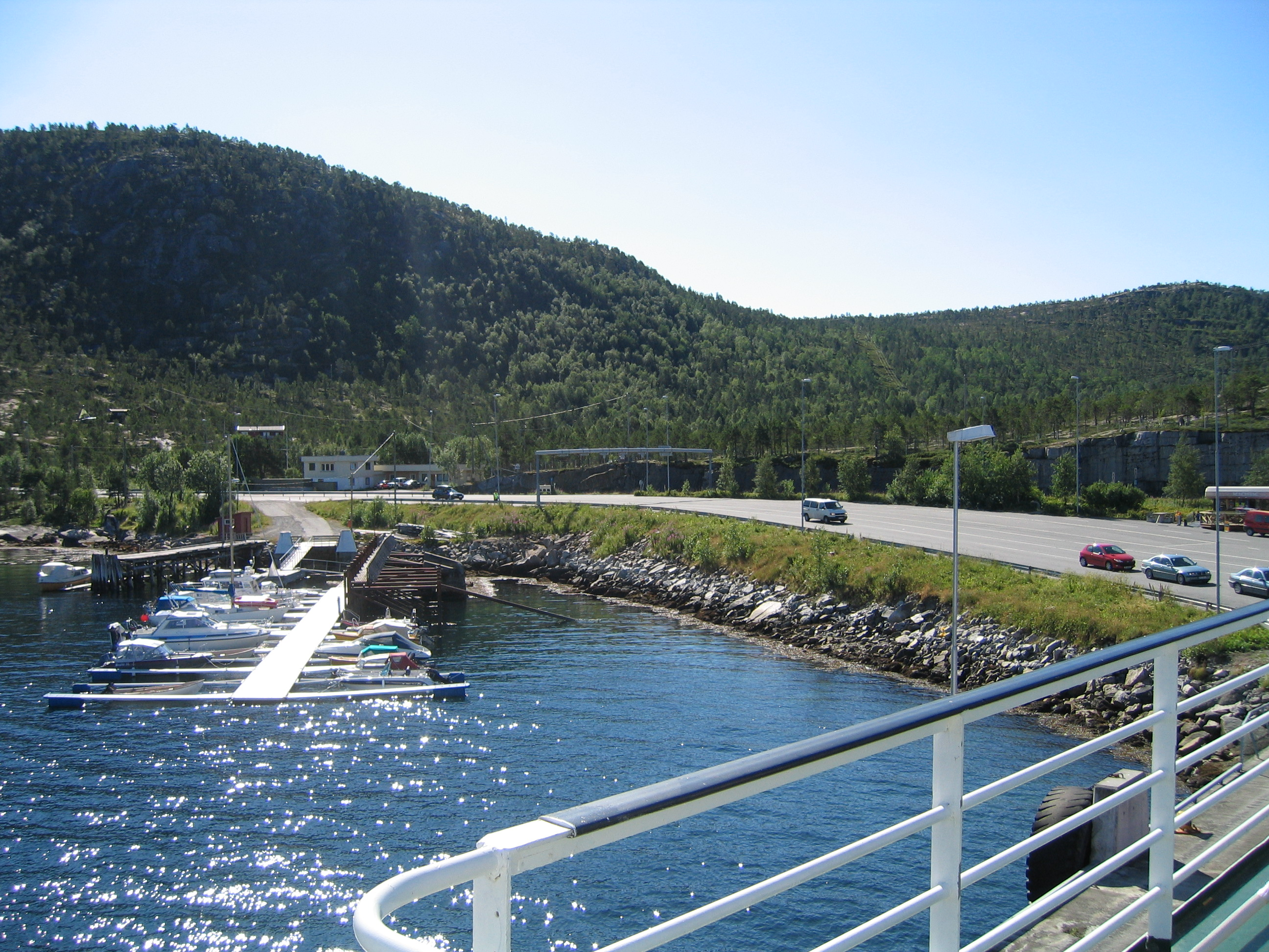 Skarberget in Nordland, Norway. Picture taken by myself.